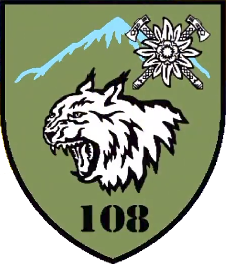 Нарукавний знак, 108 окремий гірсько-штурмовий батальйон